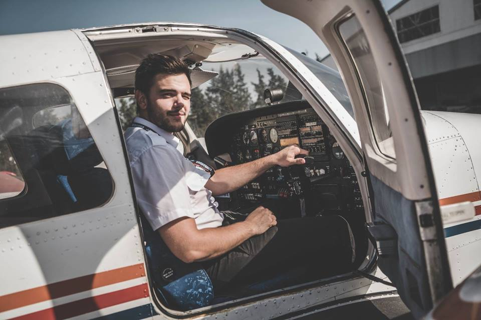 Andrea Barlesi au cours de sa formation Ici abord d'un Piper.